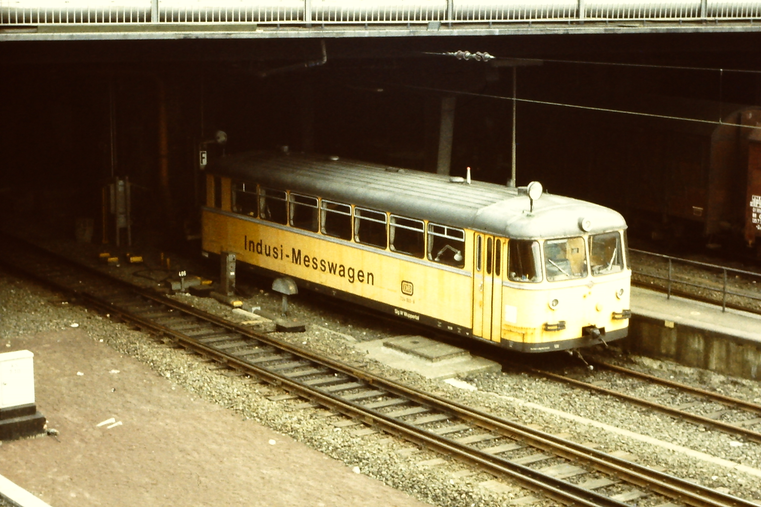 DB Indusi-Messwagen 724 002 in Hamburg Hbf DB-Baureihe 724